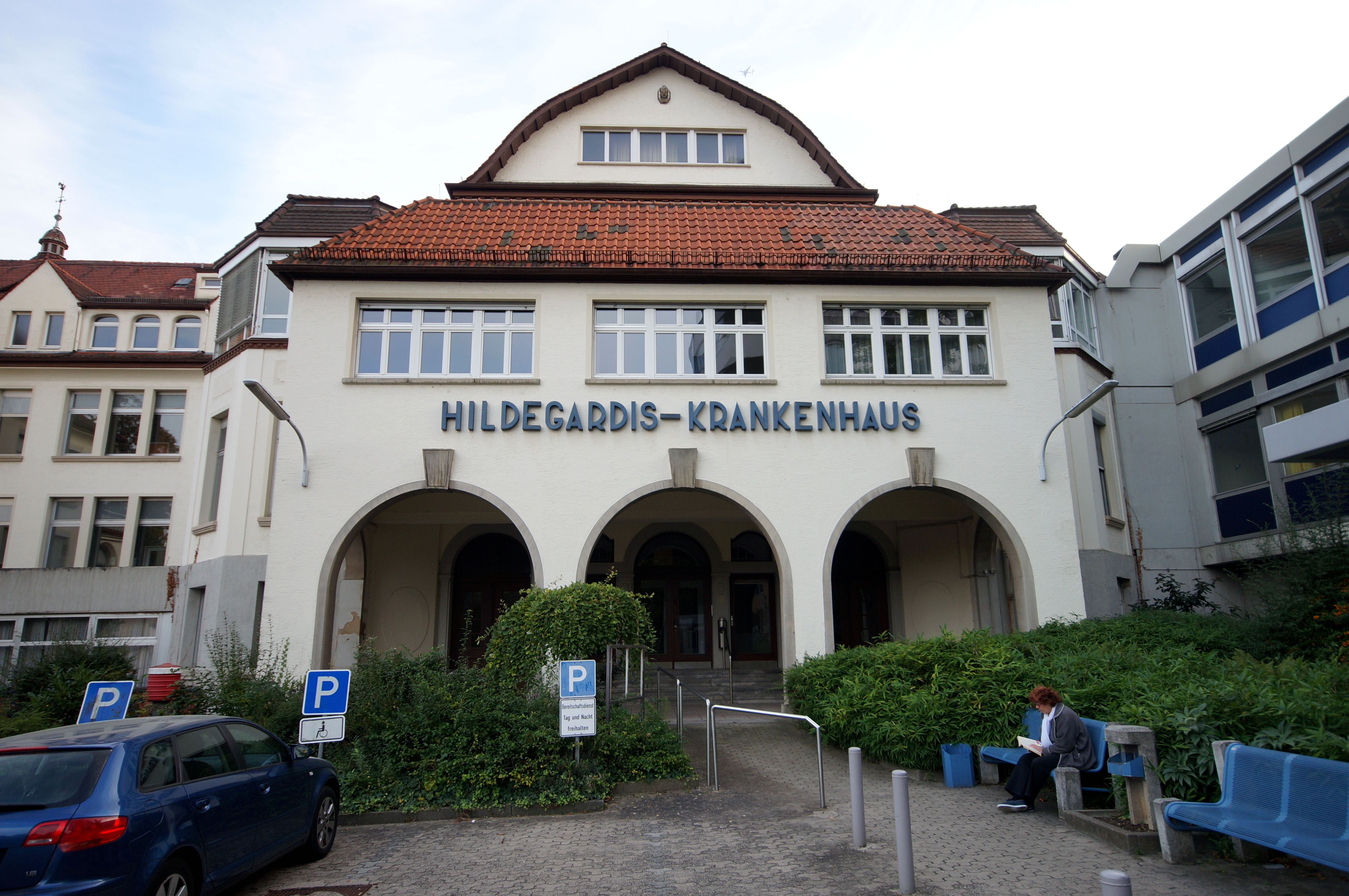 Historischer Eingang des Katholischen Klinikums Mainz (St. Hildegardis-Krankenhaus) in Mainz-Oberstadt